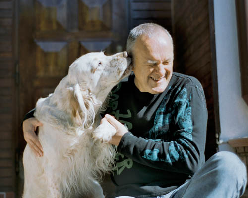 Jacek Cygan - polski autor tekstow piosenek